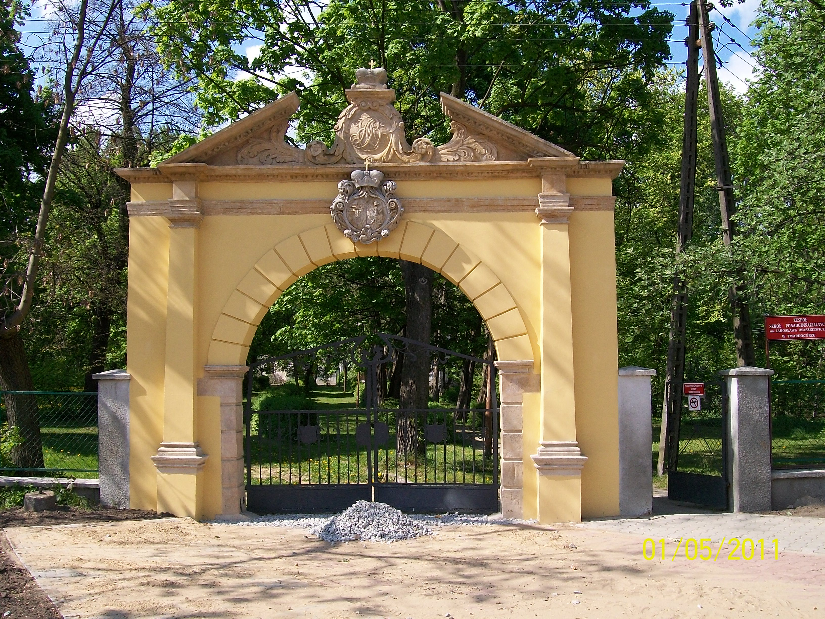 Twardogóra - zabytkowa brama wjazdowa do pałacu